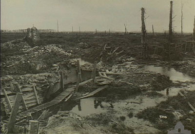 Brit lövészárkok Armentières városa közelében, miután az 1918. április 10-én vívott harcok után a németek elfoglalták